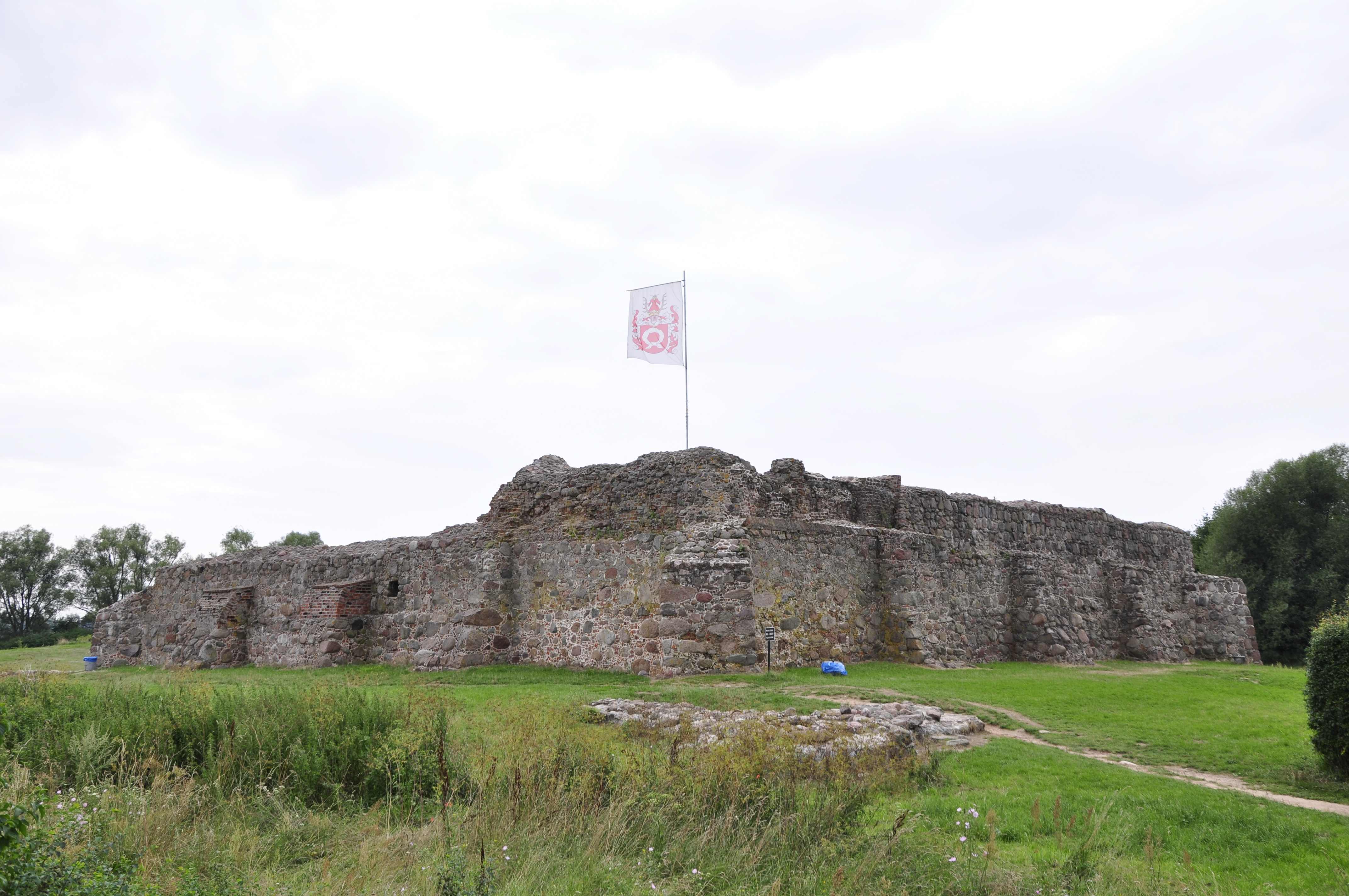 Burgruine Wenecja, Polen